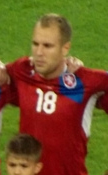 Даниэл Коларж